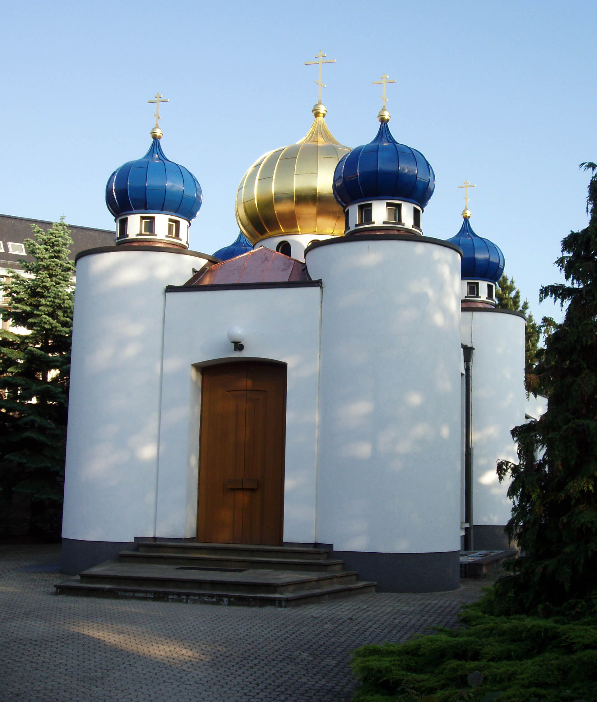 Russesch-orthodox Kierch zu Lëtzebuerg.